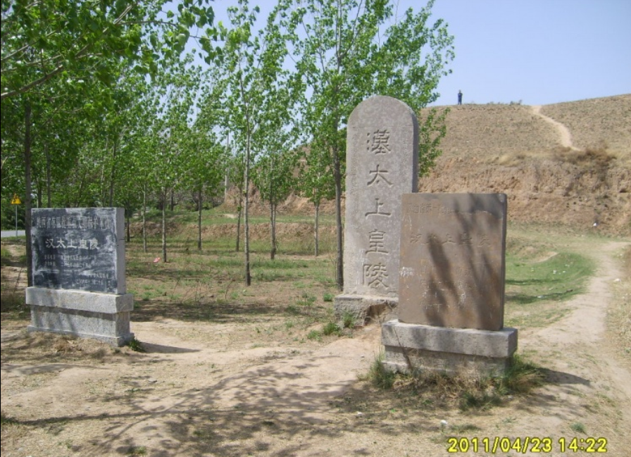 汉太上皇万年陵位于阎良区北